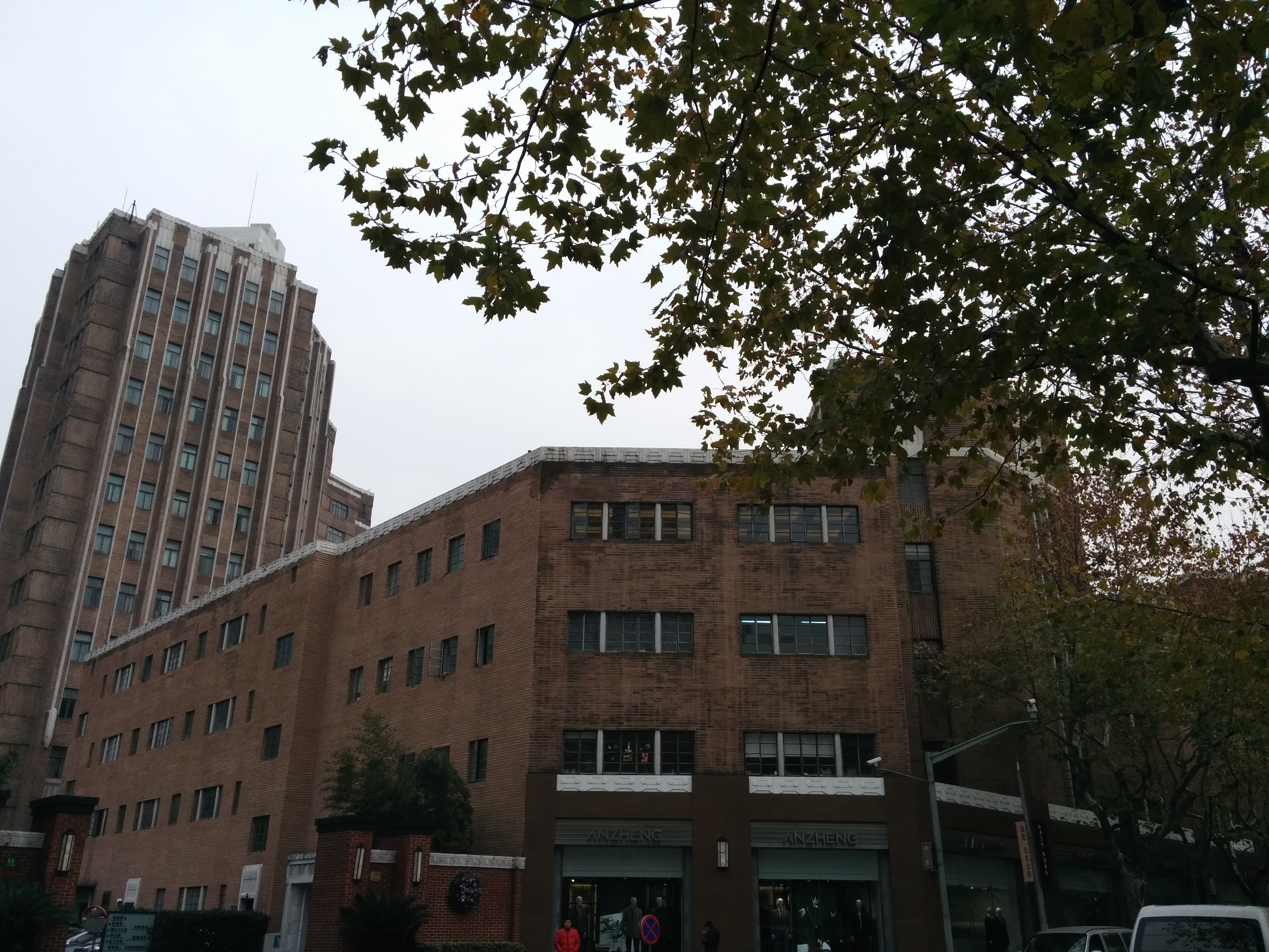 从锦江饭店正门看峻岭公寓